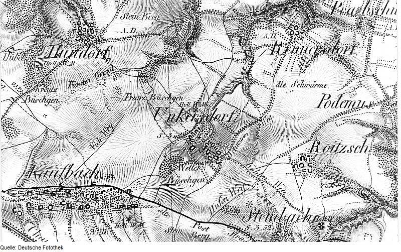 Original image description from the Deutsche Fotothek Dresden-Unkersdorf. Ausschnitt aus: Oberreit Sect. Dresden, 1821/22